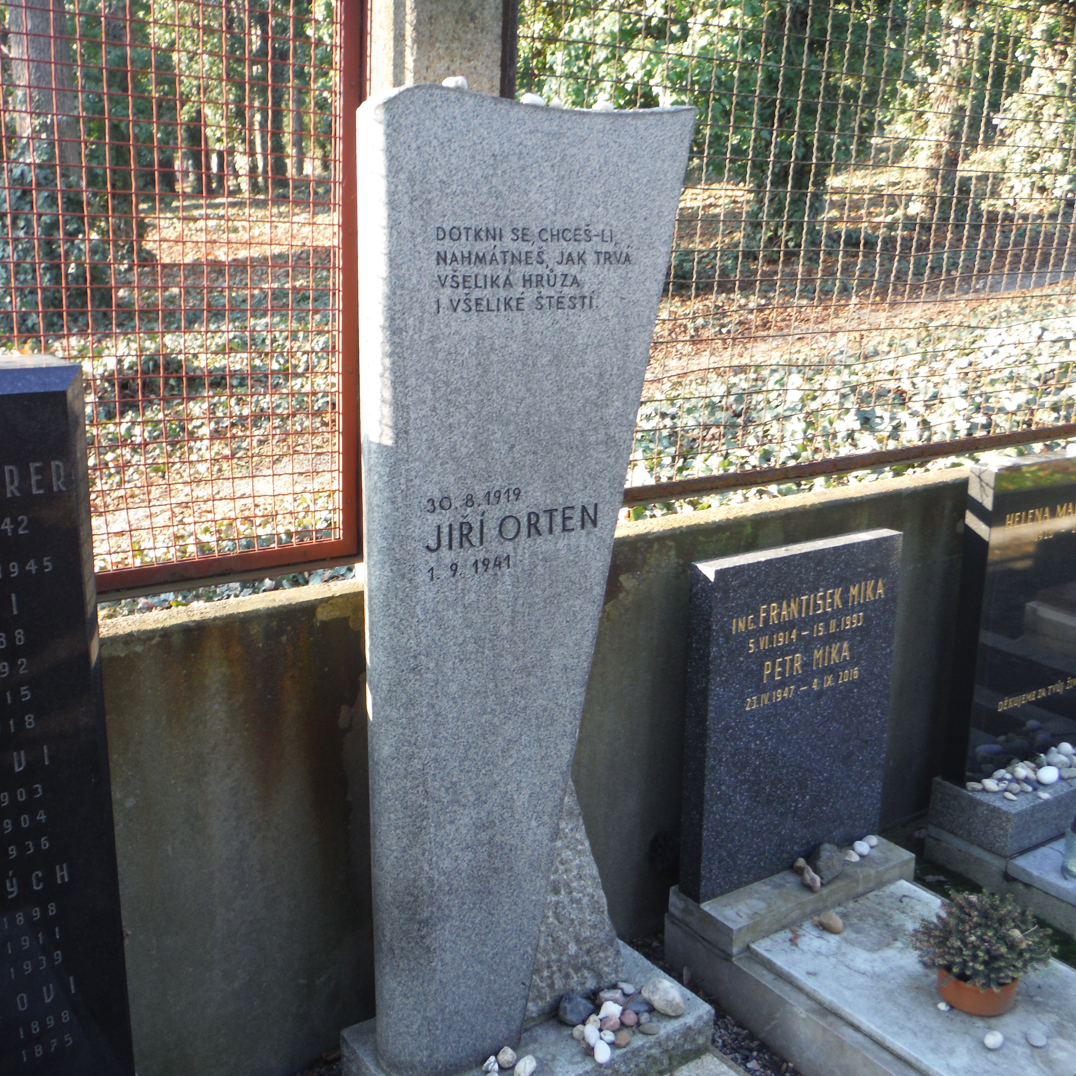 hrob